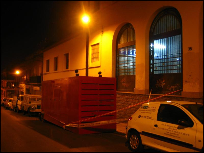 Apagada Barcelona - Generador Mercat del Guinardó (Passatge Llívia, 34)